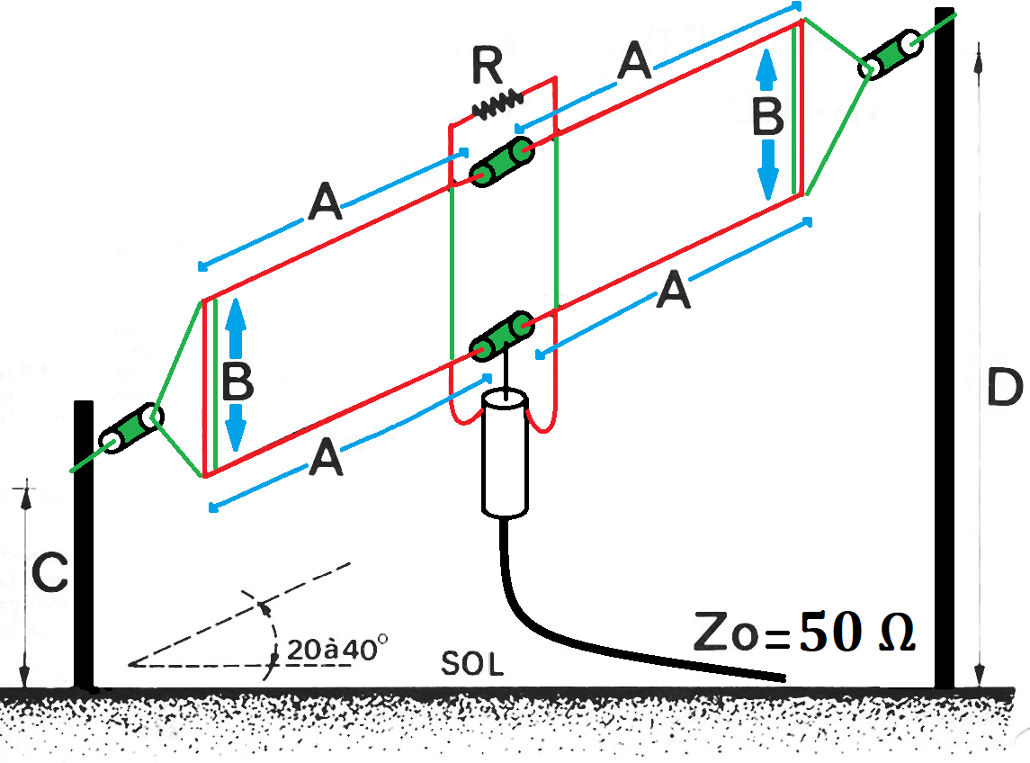 Antenne W3HH de 50 Ω radioamateur. A(métres) = 50/F(MHz) fréquence la plus faible, B(métres) = 3/F(MHz) fréquence la plus faible, C = 1,85 métres. R = 800 Ω (pour présenter 800 Ω au symétriseur d'un rapport de 16:1) ou R = 650 Ω (pour présenter 600 Ω au symétriseur d'un rapport de 12:1) ou R = 390 Ω (pour présenter 300 Ω au symétriseur d'un rapport de 6:1). Angle au sol 20 à 40°.